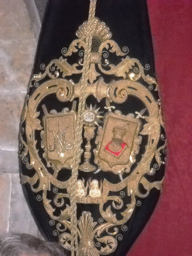 Escudo que aparece en el bacalao de la Hermandad